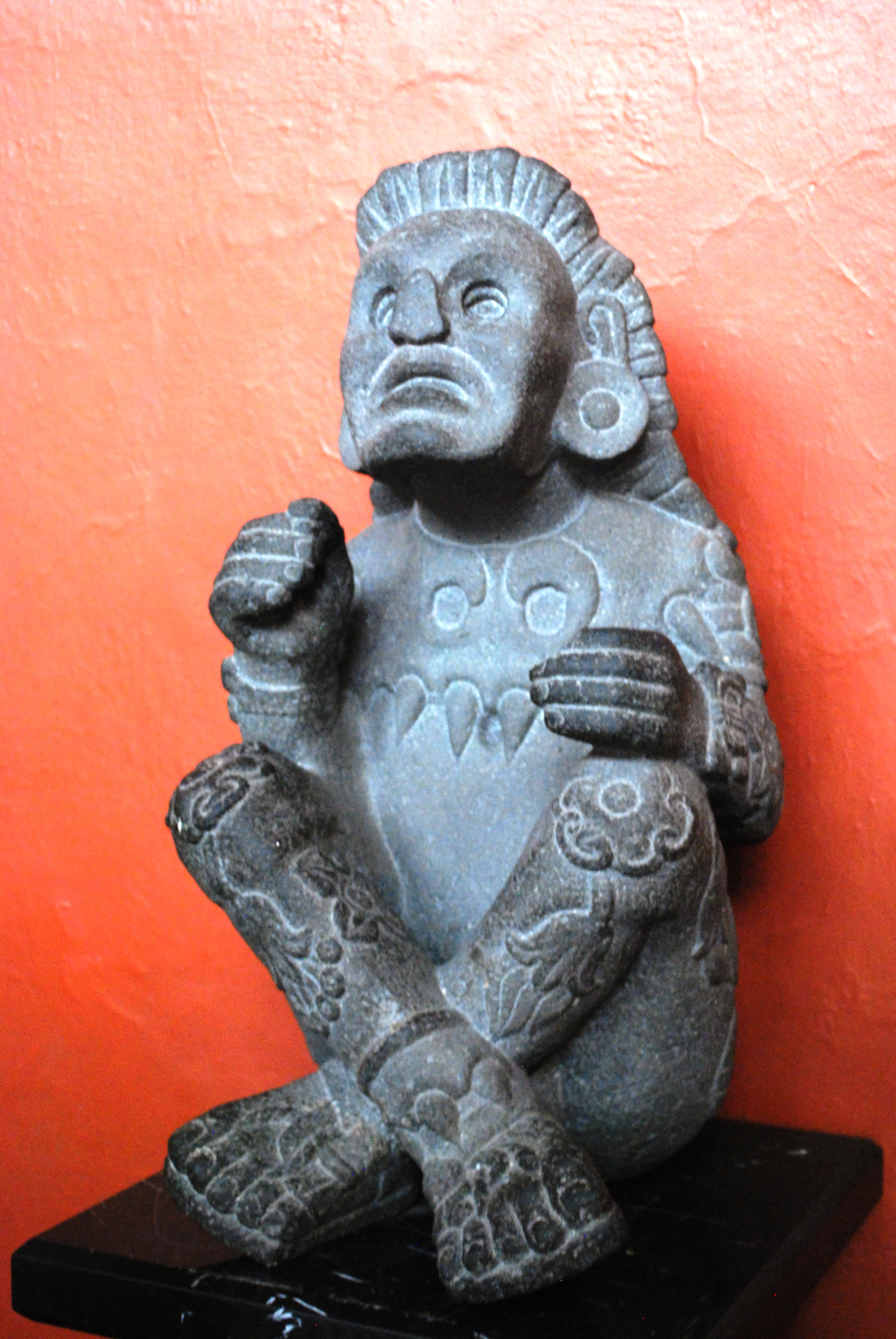 Figura de piedra de Mesoamérica en la escalera del patio principal del Museo de la Ciudad de México en el centro histórico de la Ciudad de México